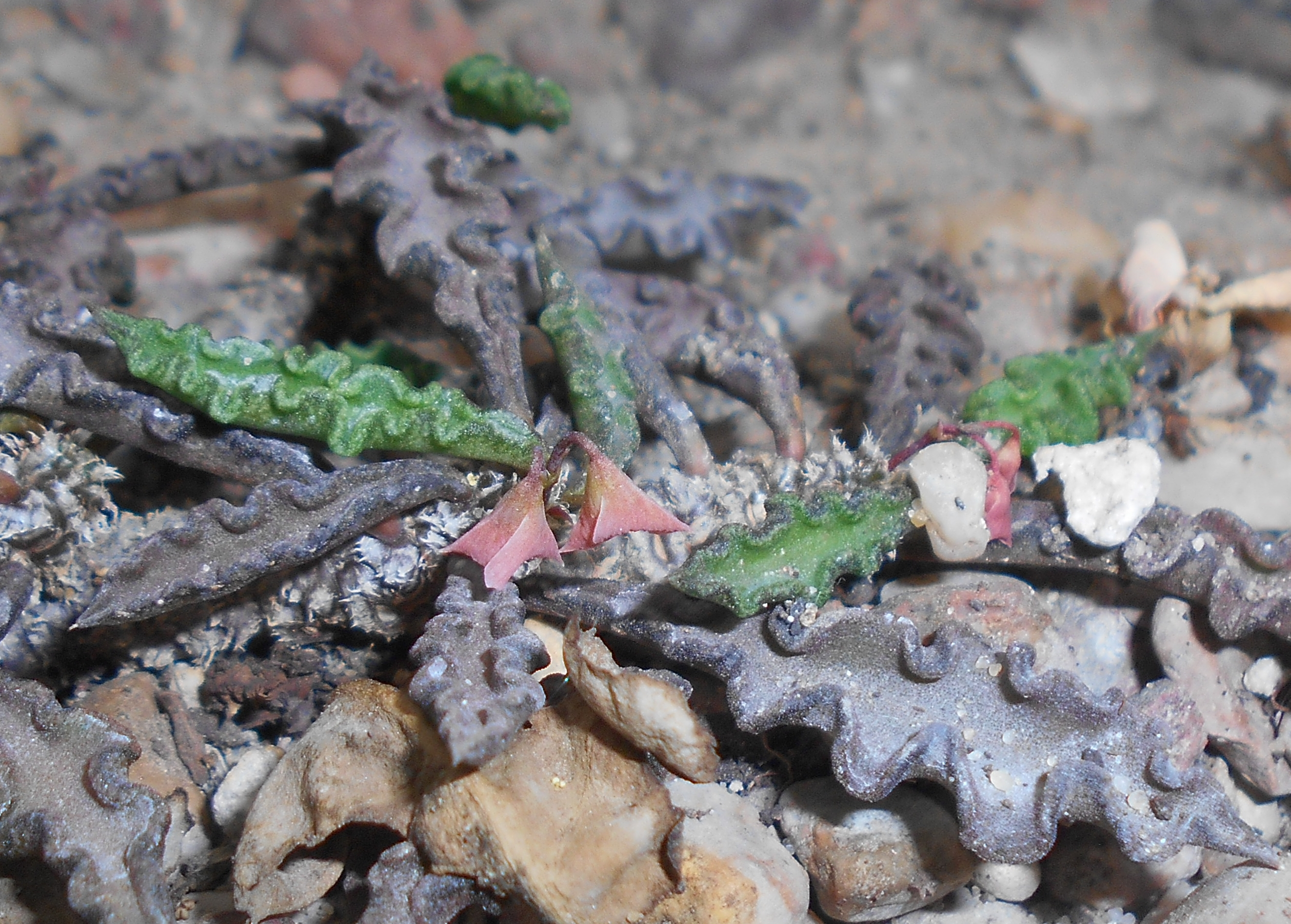 Euphorbia decaryi var. spirosticha, Ogród Botaniczny UMCS w Lublinie.